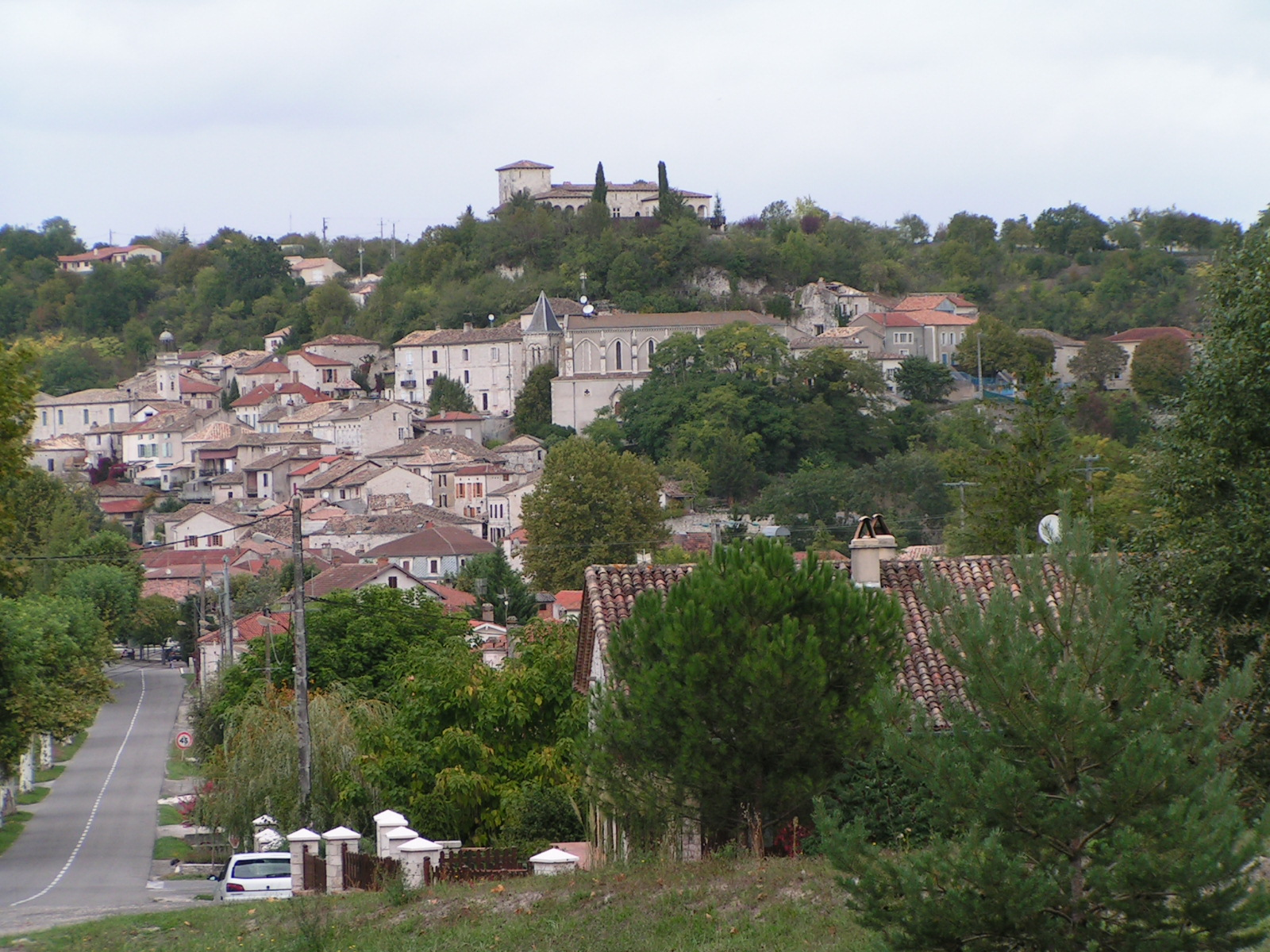 Vue de Montaigu-de-Quercy (Tarn-et-Garonne, France).